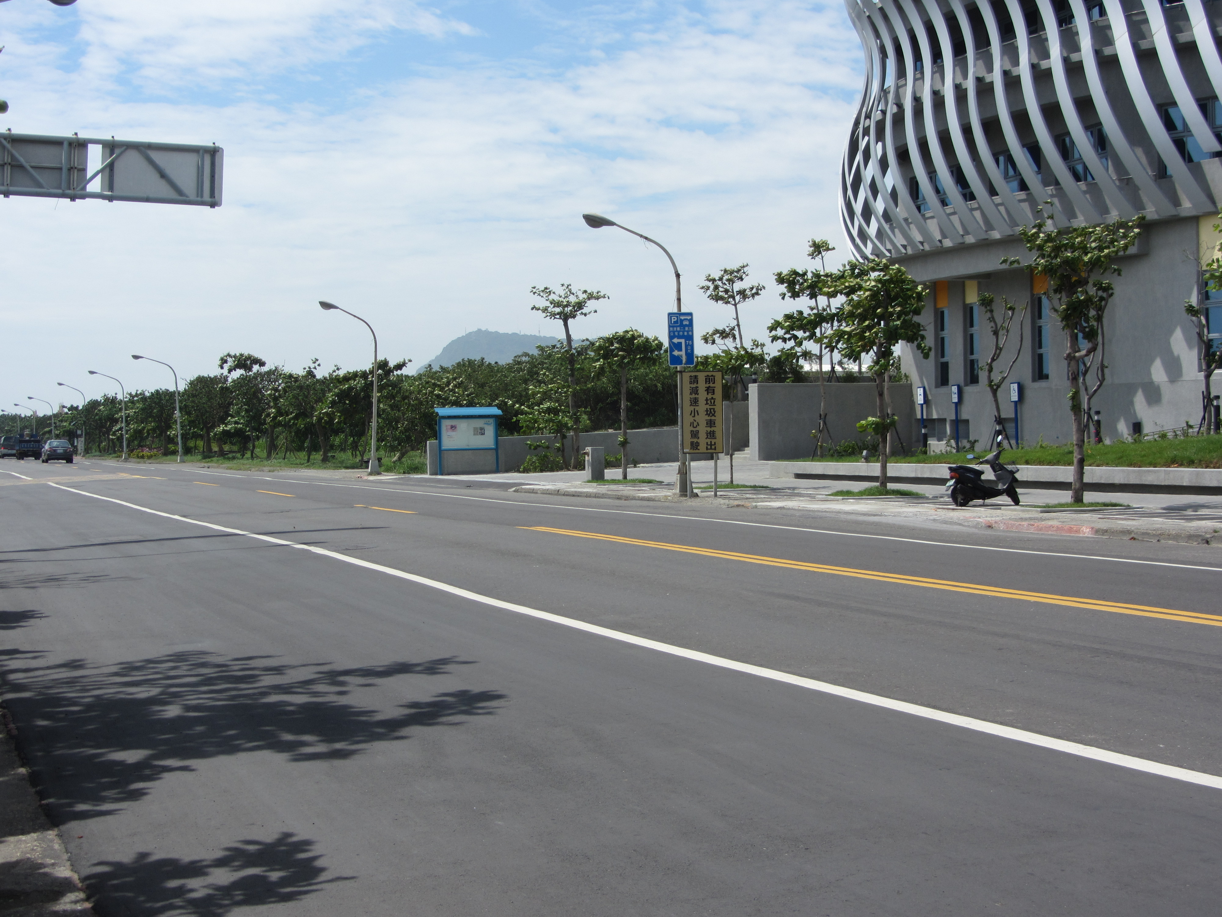 高雄市旗津區旗津二路，旗津區行政中心前。